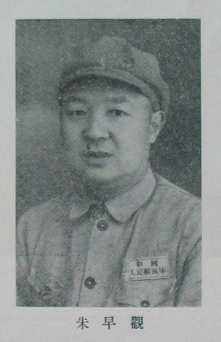 中文（台灣）: 中國人民政治協商會議第一屆全體會議代表